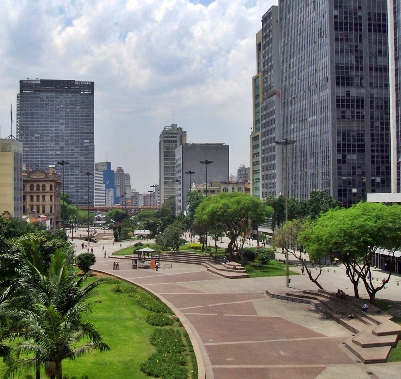 Vale do Anhangabaú, no centro de São Paulo, Brasil